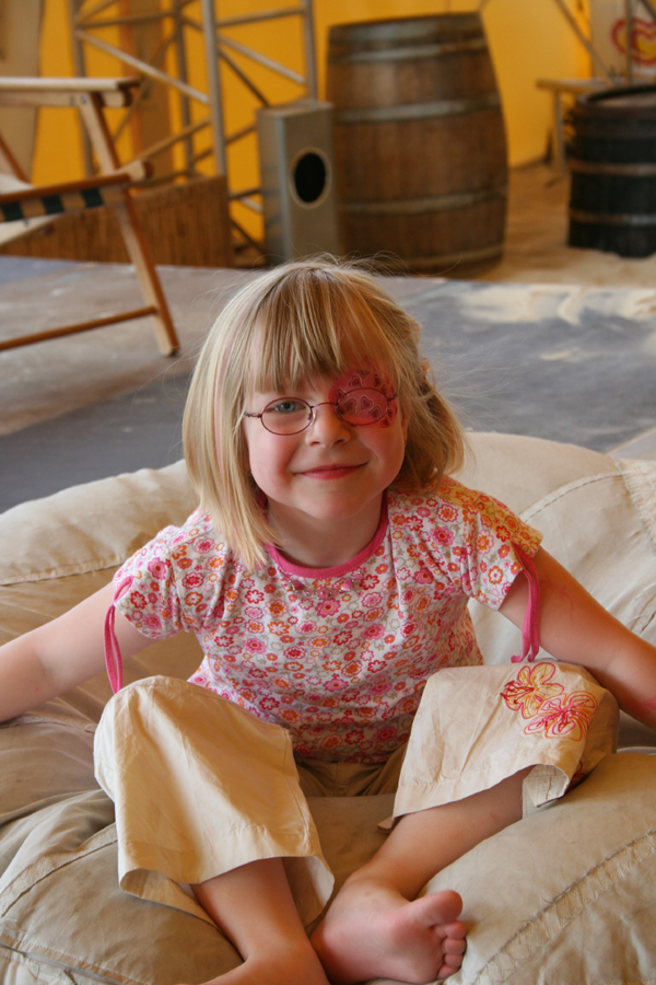 Pflaster